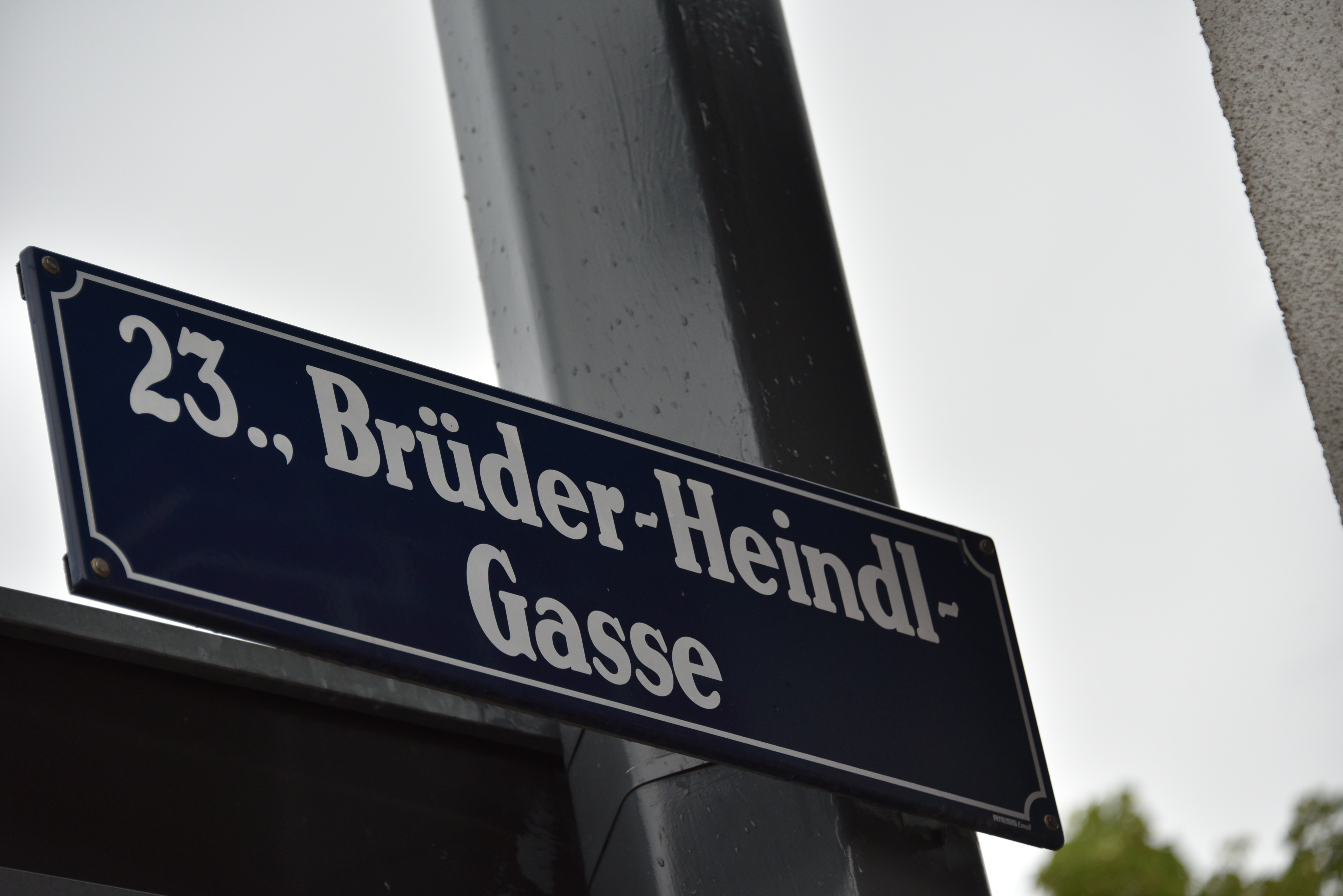 Brüder-Heindl-Gasse in Wien-Liesing